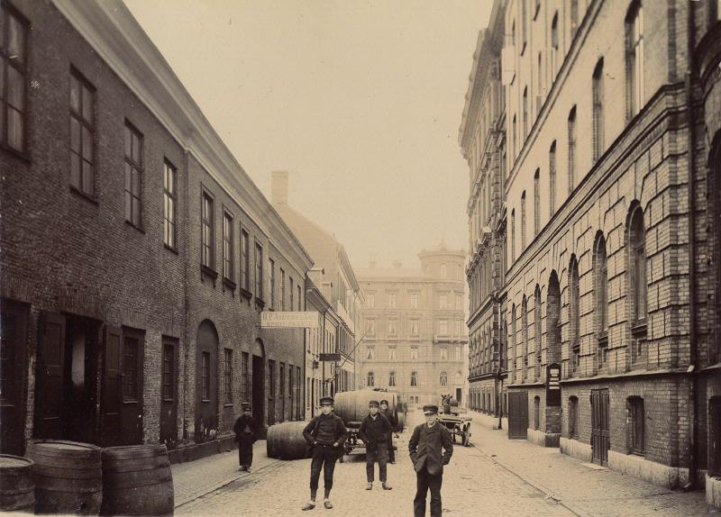 Lilla Klädpressaregatan åt vester, från hörnet af Norra Larmgatan. Till venster Engelska Konsulatet (huset med flaggstången), tomtnr 5 i X roten), i fonden huset no 1,3 (tomtnr 106/107 i X r.) vid Östra Hamngatan. 1888.